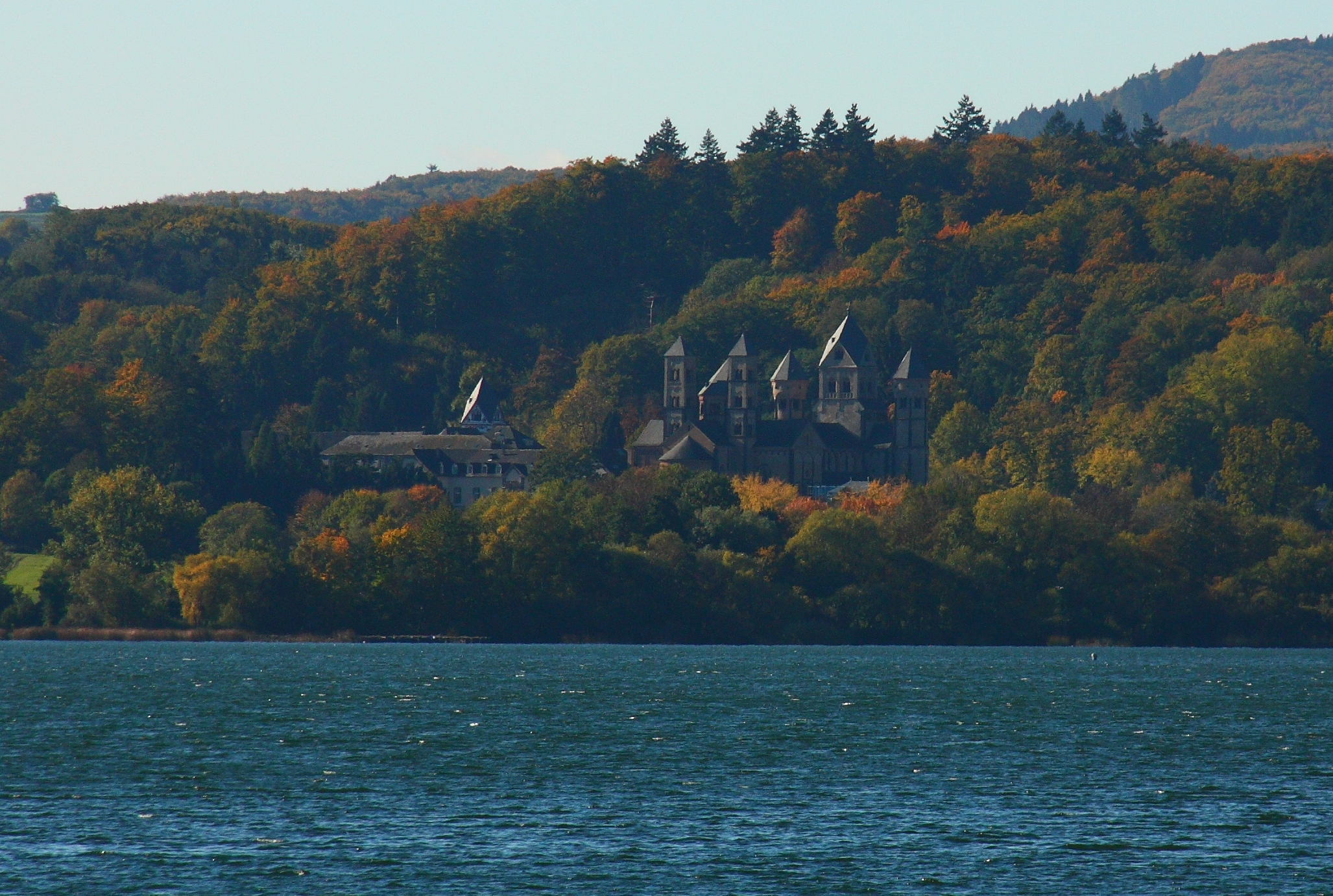 Abtei Maria Laach: 1093 gegründet, 1127 selbstständige Abtei, 1802 aufgelöst, 1863–73 mit Jesuiten, seit 1892 wieder mit Benediktinern der Beuroner Kongregation besetzt; die Abteikirche in sechs Bauabschnitten 1093–1220 entstanden: mehrtürmige, doppelchörige, dreischiffige Gewölbebasilika mit zwei Querhäusern, Paradies mit Skulpturen wohl des Laacher Samsonmeisters, Ausstattung; Klosteranlage: Binnenhof, Kreuzgang unter Beibehaltung romanischer Reste, südlicher Binnenhof in der zweiten Hälfte des 18. Jahrhunderts von Johannes Seiz, Anlage nach Brand 1855 stark verändert, als Eingang Putzbau, 20. Jahrhundert, mit drei Standfiguren; Nikolauskapelle: Westturm mit Rhombendach, um 1220/30, Saalbau 1757; Johanneskapelle: Tuffquaderbau, wohl 19. oder 20. Jahrhundert; Gartenhaus, Ende des 17. Jahrhunderts; zugehörig die Klostermauer